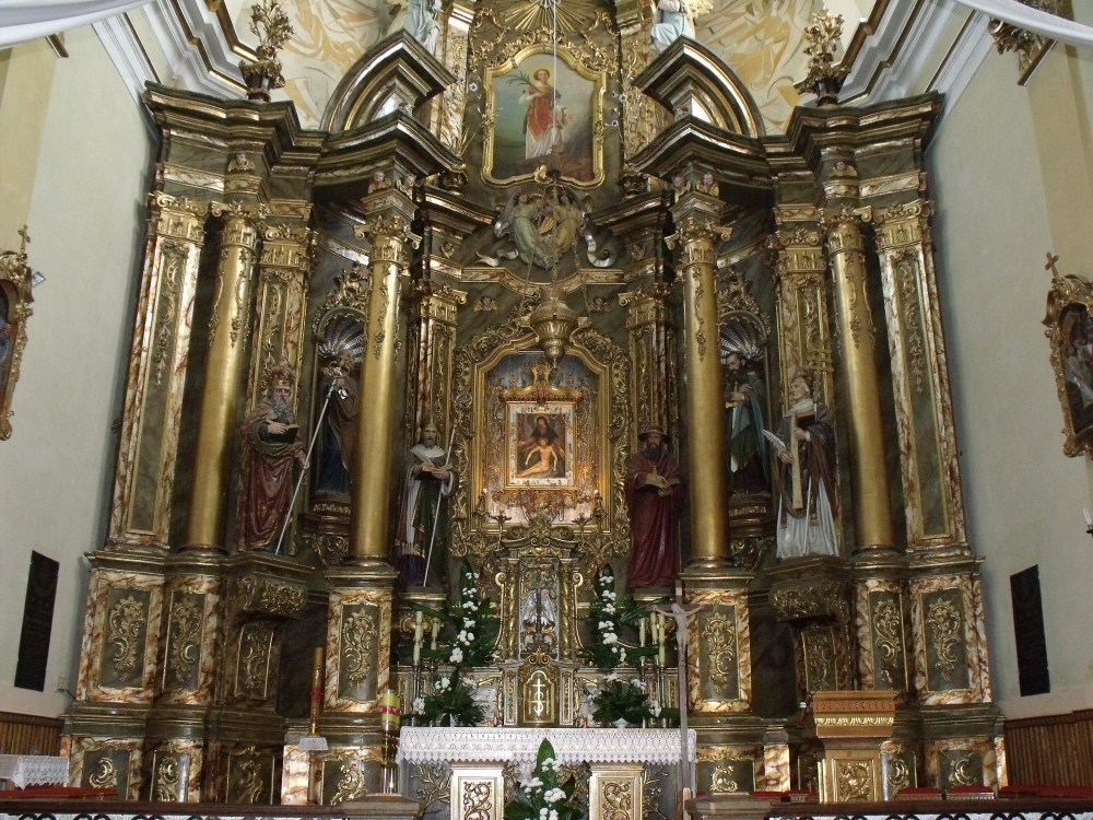 Wnętrze kościoła św. Wawrzyńca w Rymanowie - ołtarz główny